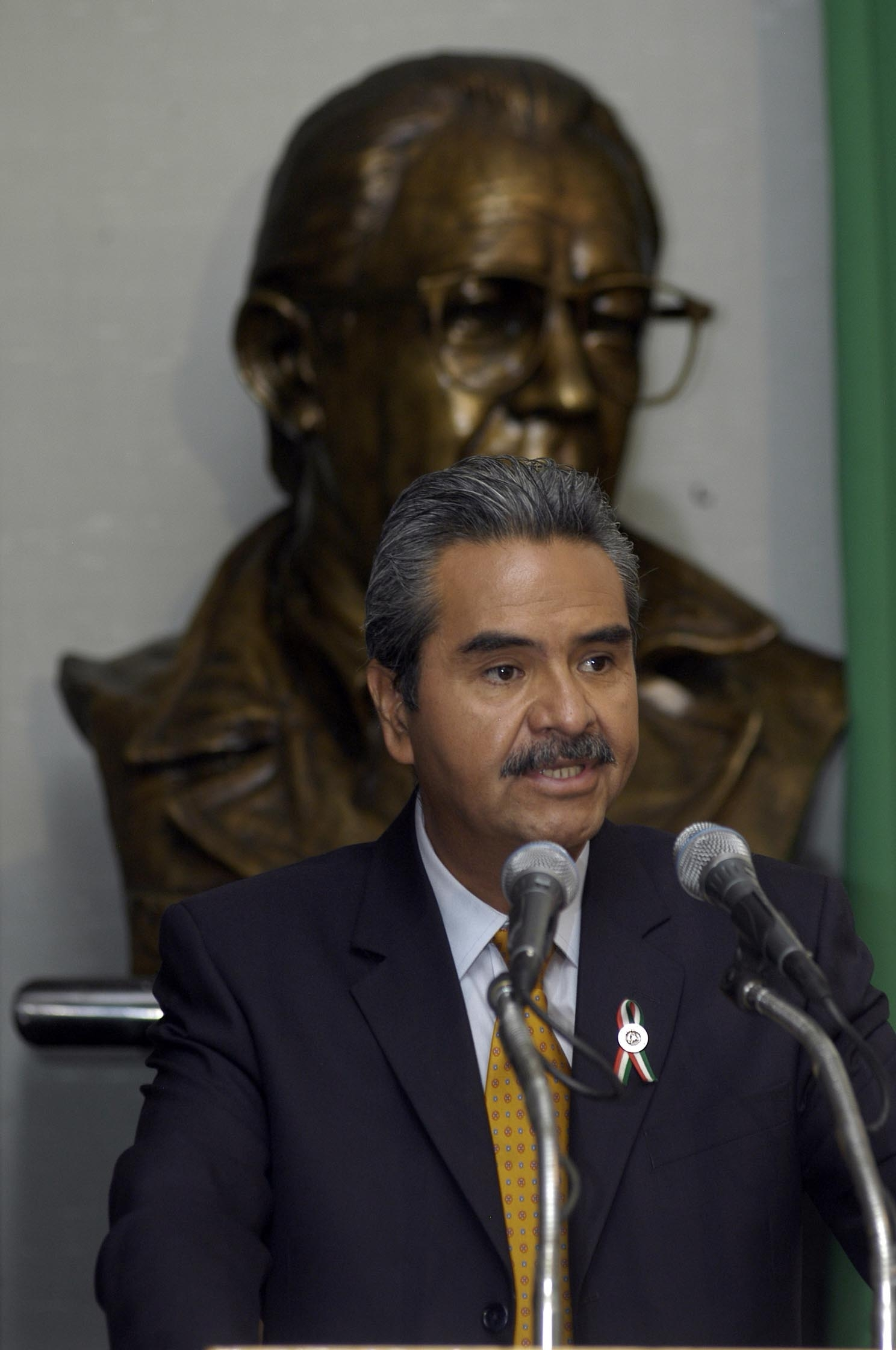 Diputado Agustín Guerrero Castillo, Secretario de la Comisión de Gobierno de la Asamblea Legislativa del Distrito Federal, México.